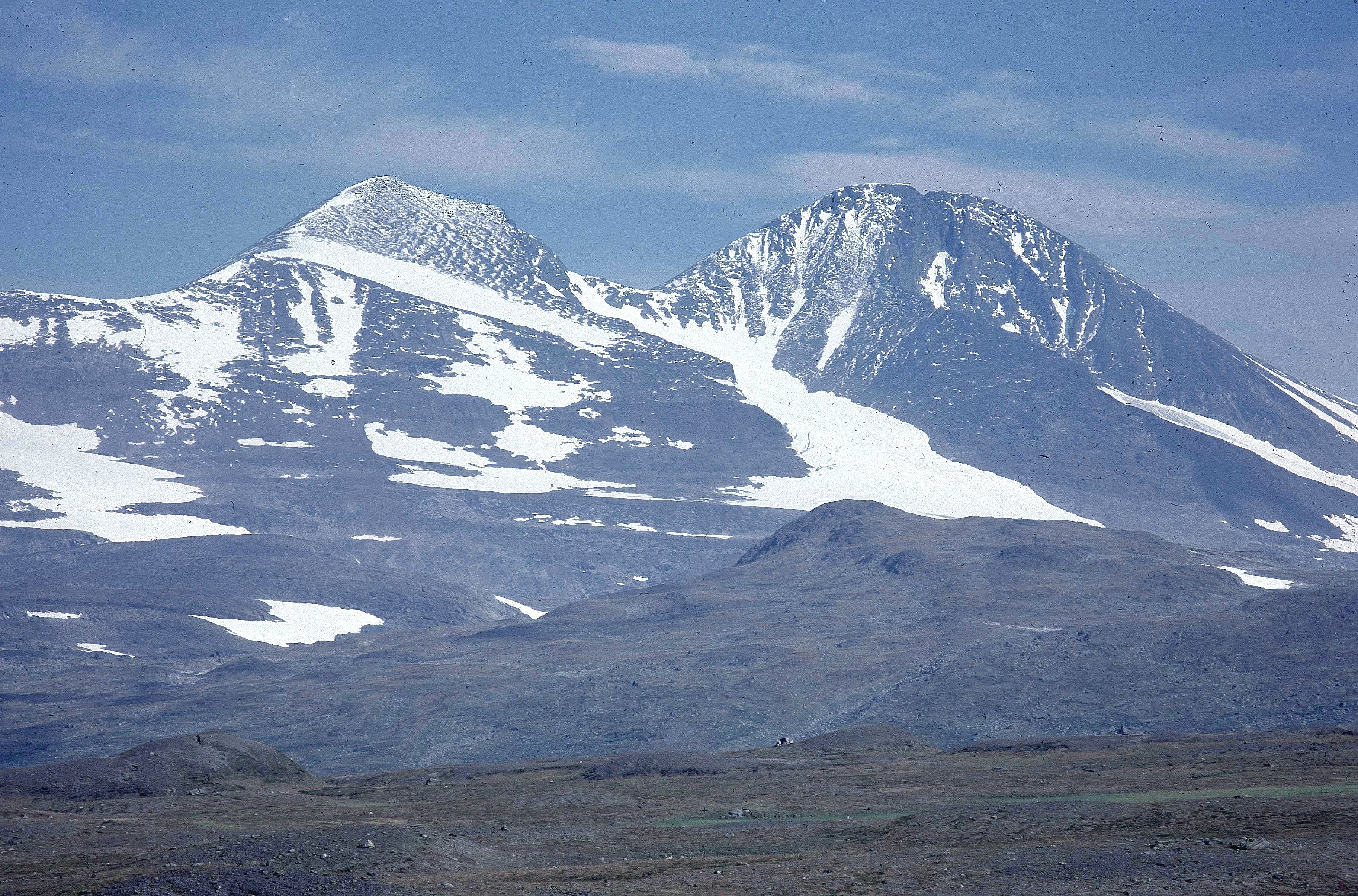 Högsta topparna i Akka-massivet.